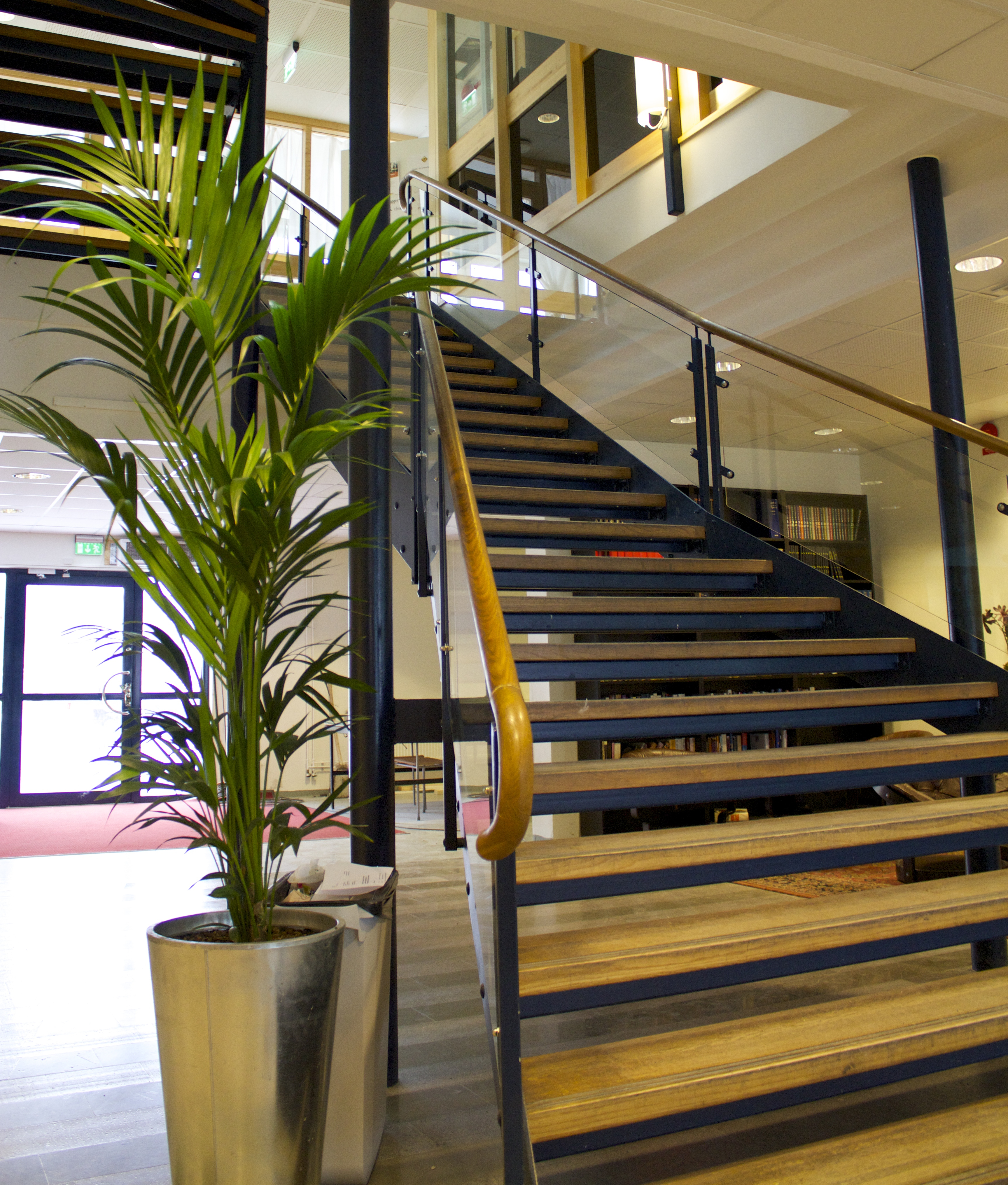 Välkommen till Skärgårdsgymnasiet